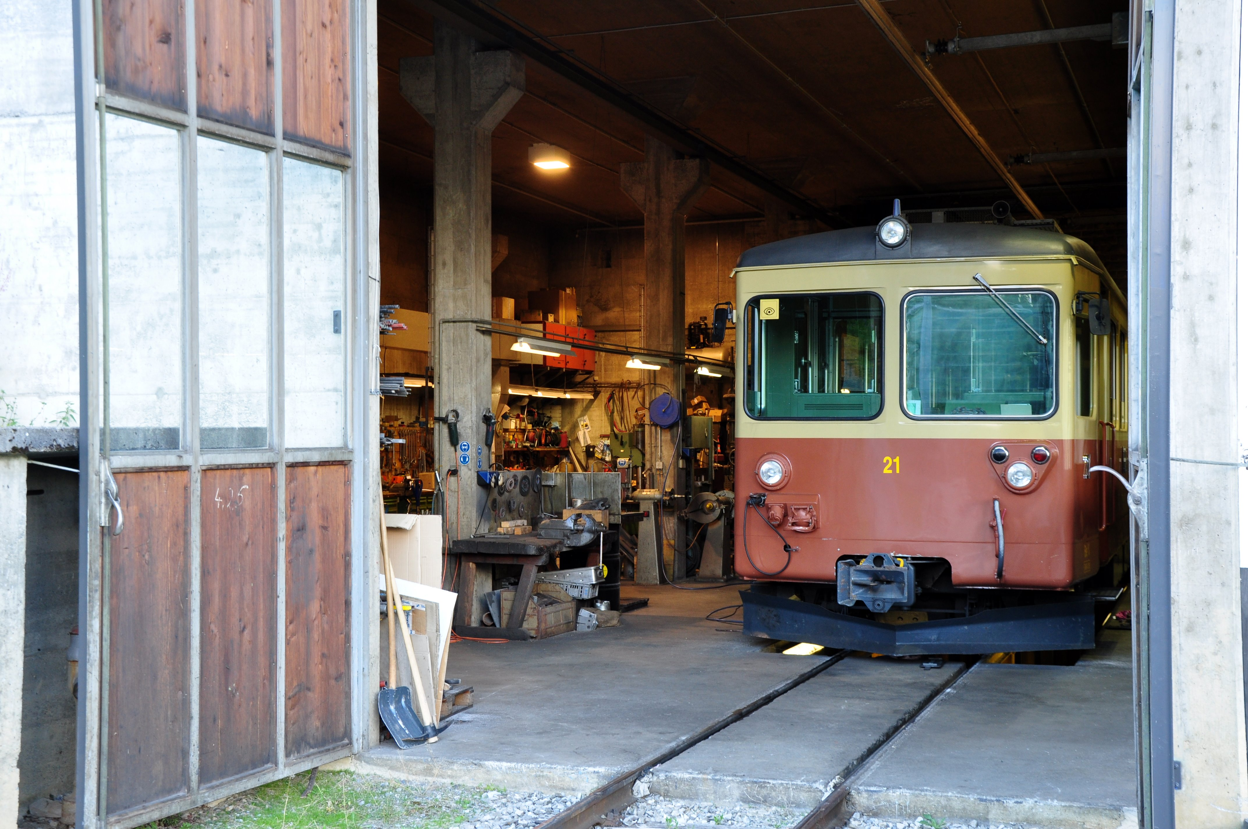 Switzerland, Canton of Bern, Mürrenbahn